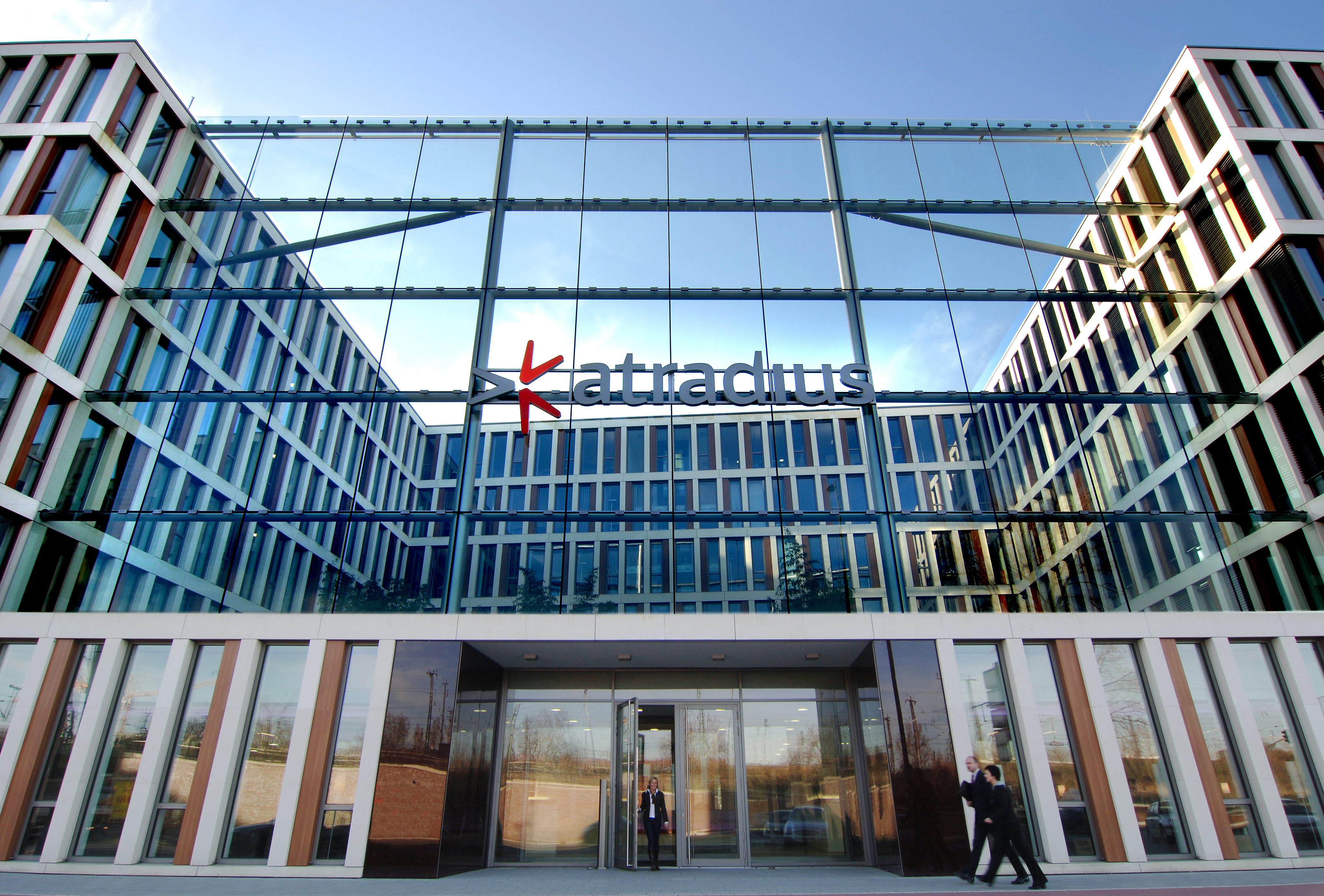 Headoffice Atradius Deutschland in Köln Deutz